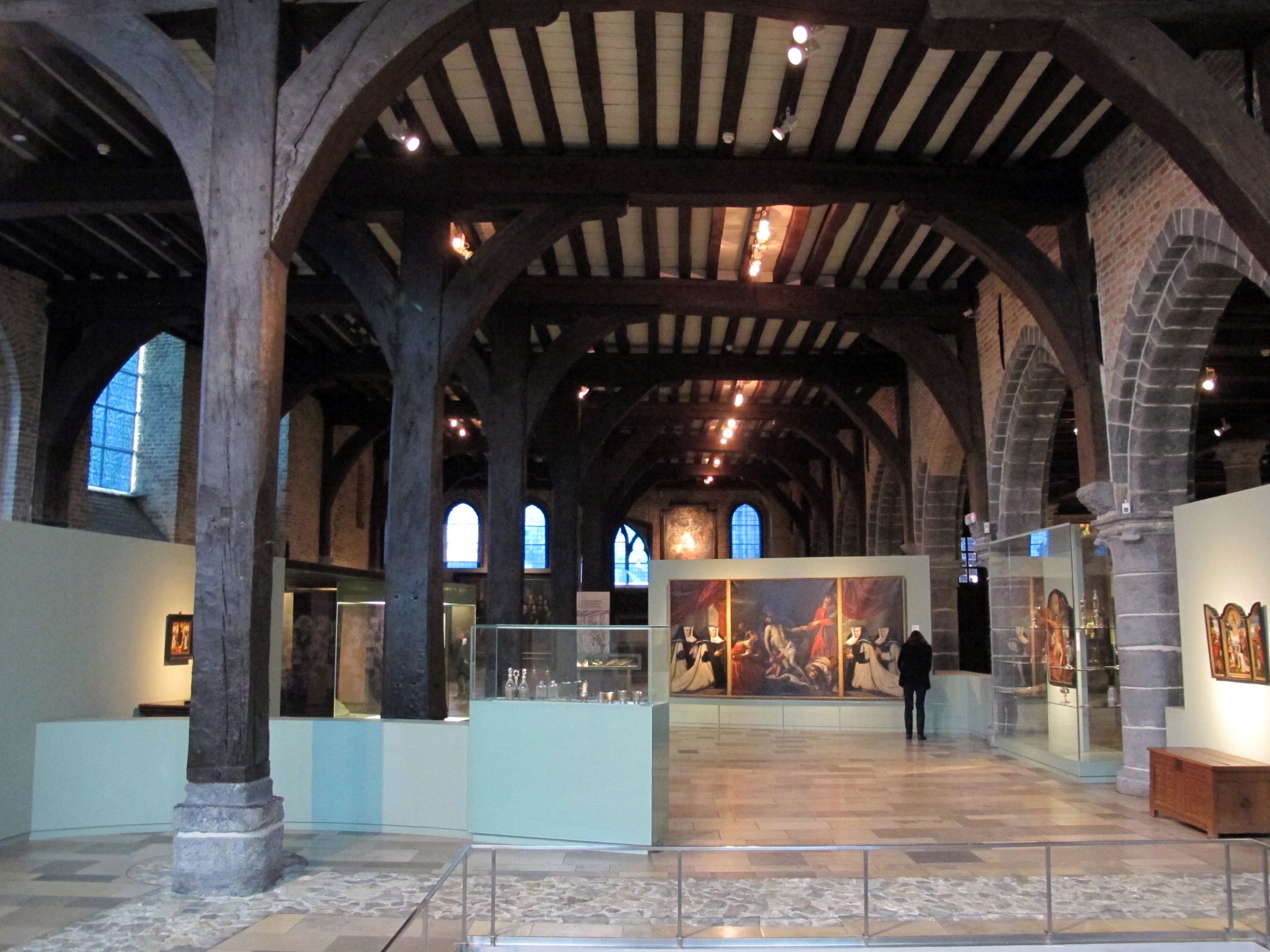 Memlingmuseum, int.